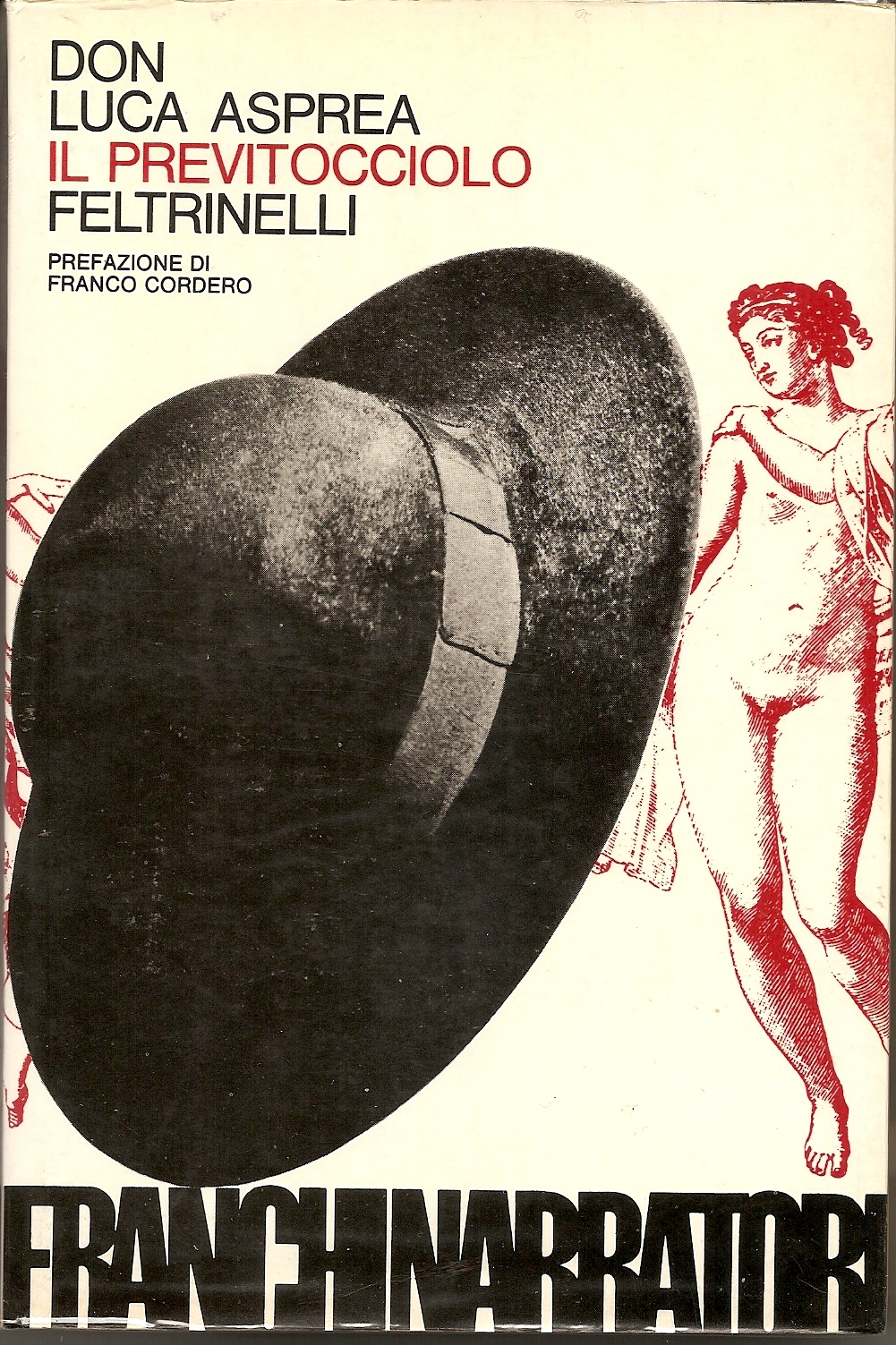 Copertina prima edizione de "Il previtocciolo", Don Luca Asprea, Milano, Feltrinelli, 1971